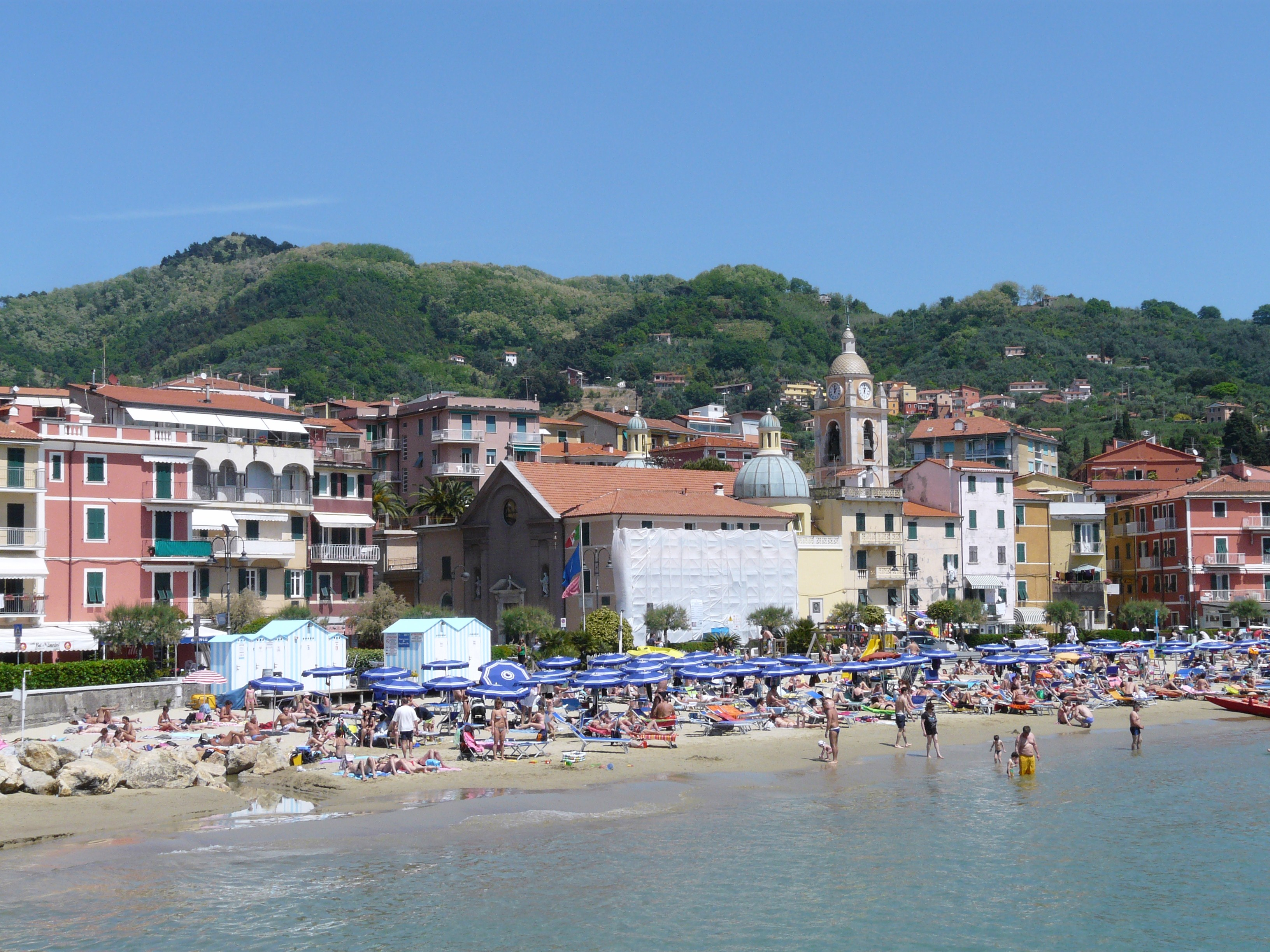 Panorama di San Terenzo, Lerici, Liguria, Italia